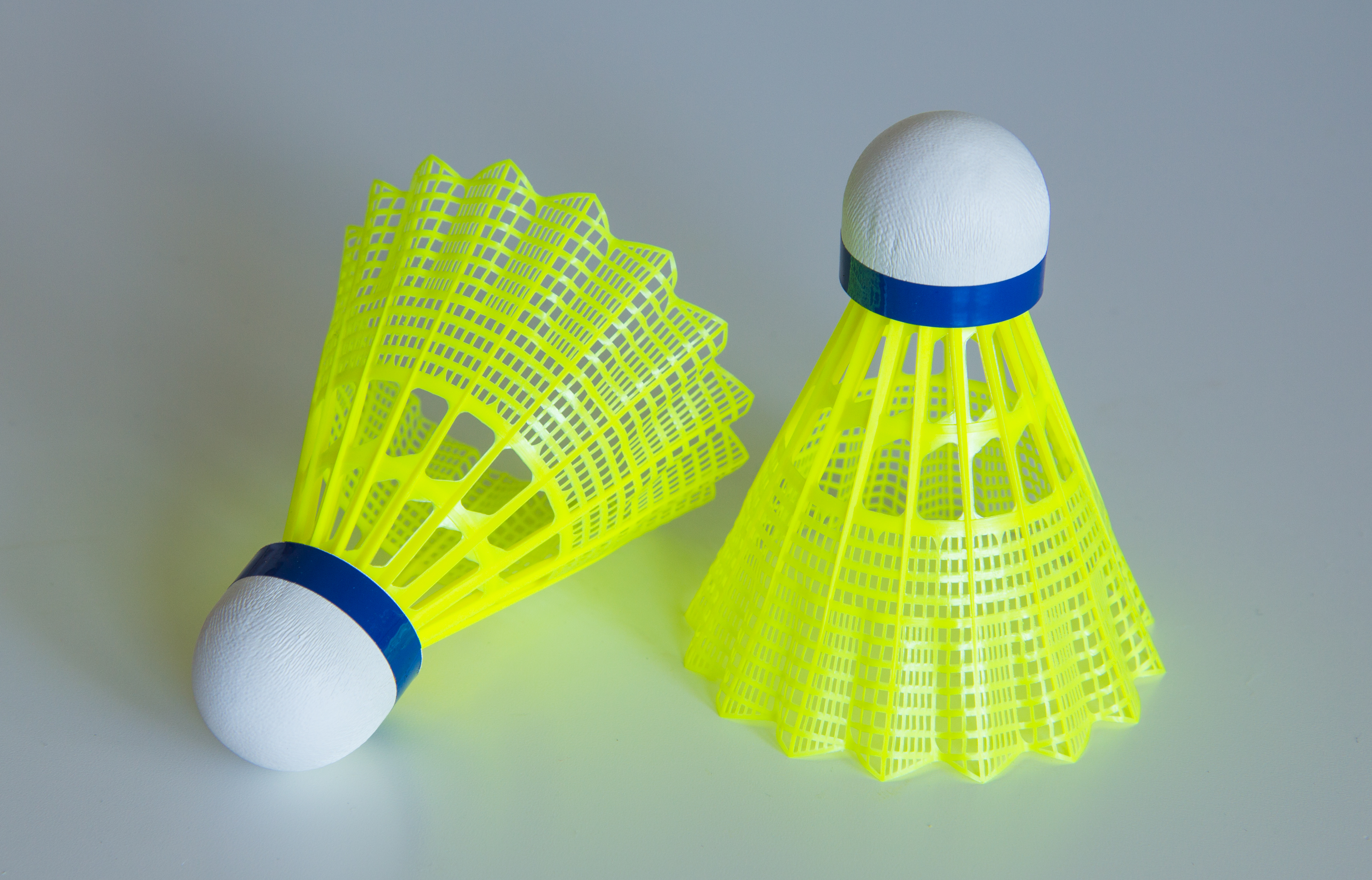 Zwei Shuttlecocks mit gelbem Nylonkranz.